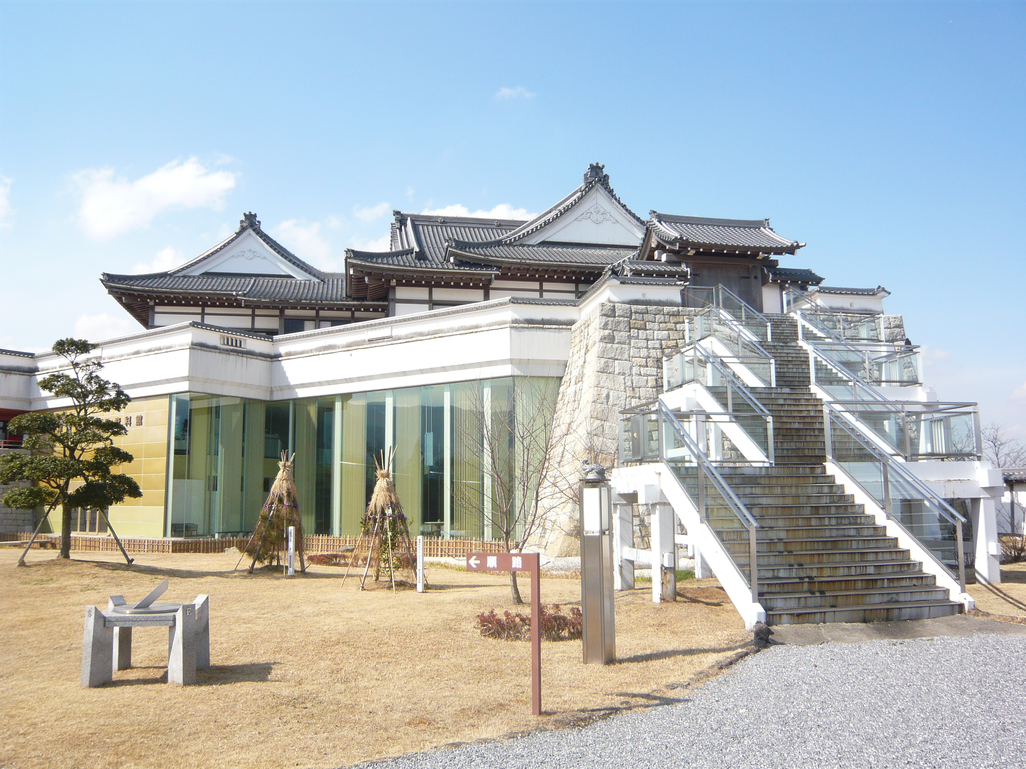 Kaizu City Museum（海津市歴史民俗資料館）,Kaizu,Gifu,Japan（岐阜県海津市）で撮影。